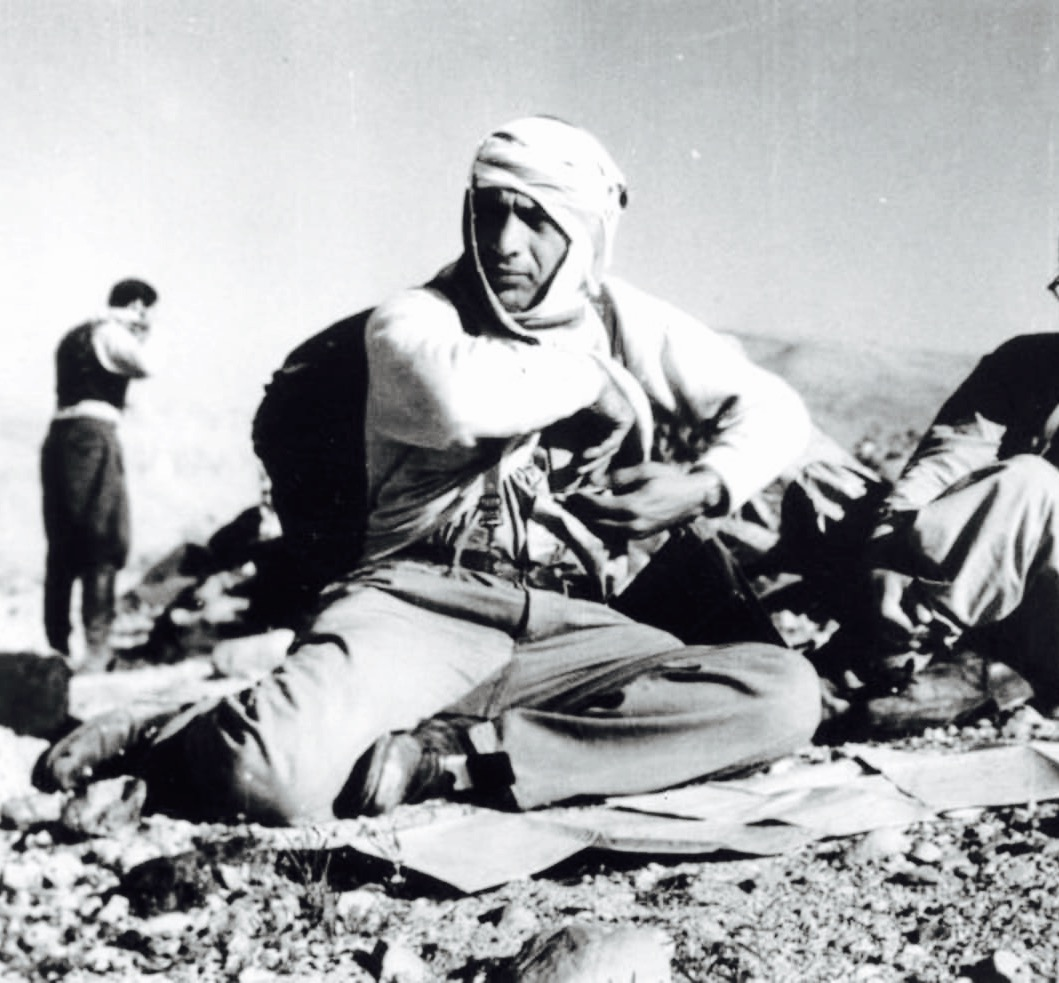 מנשק׳ה כסייר בנגב